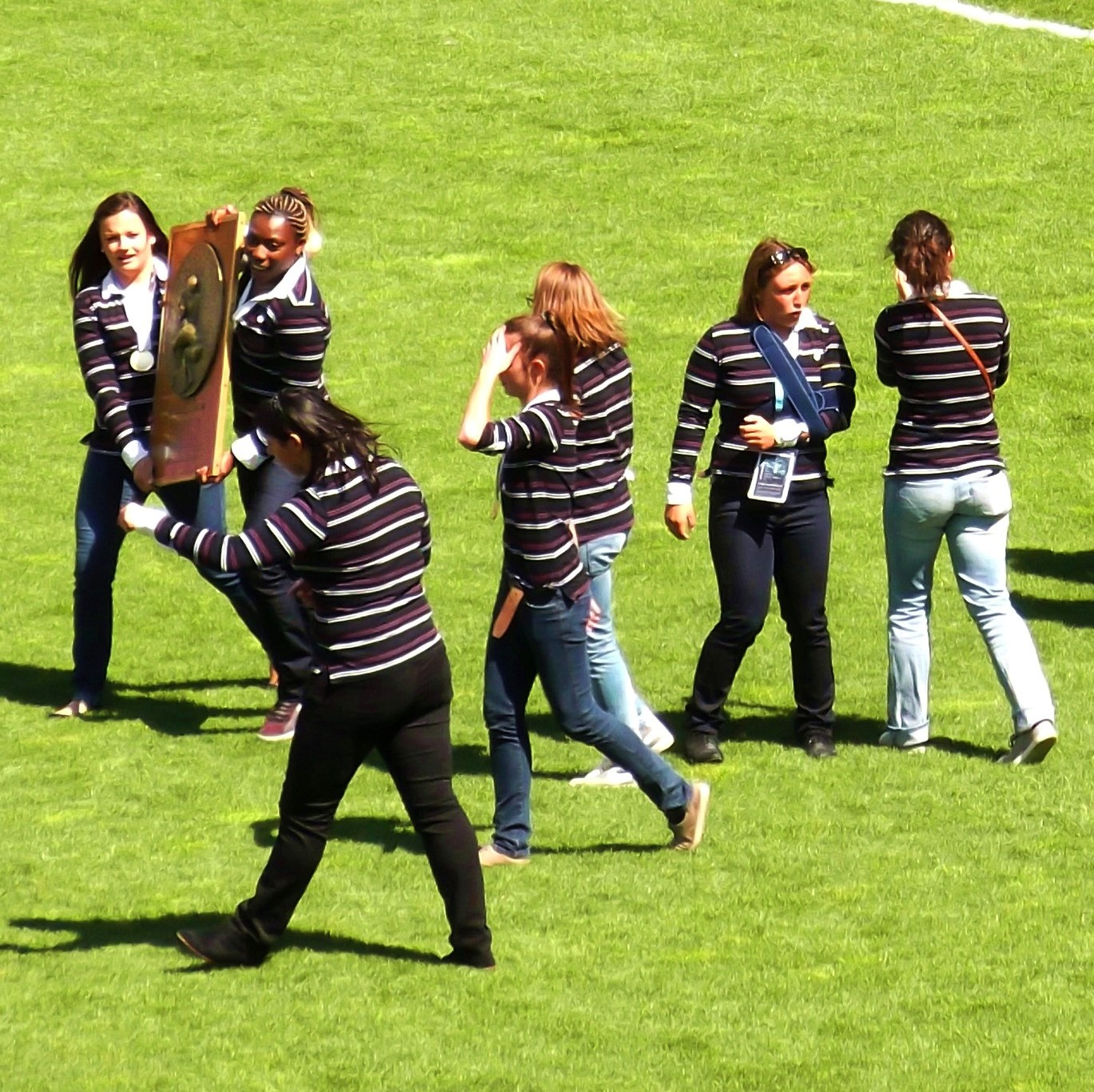 Tour d'honneur des féminines du MHR ("Coccinelles") à la mi-temps du match Montpellier - RM 92.